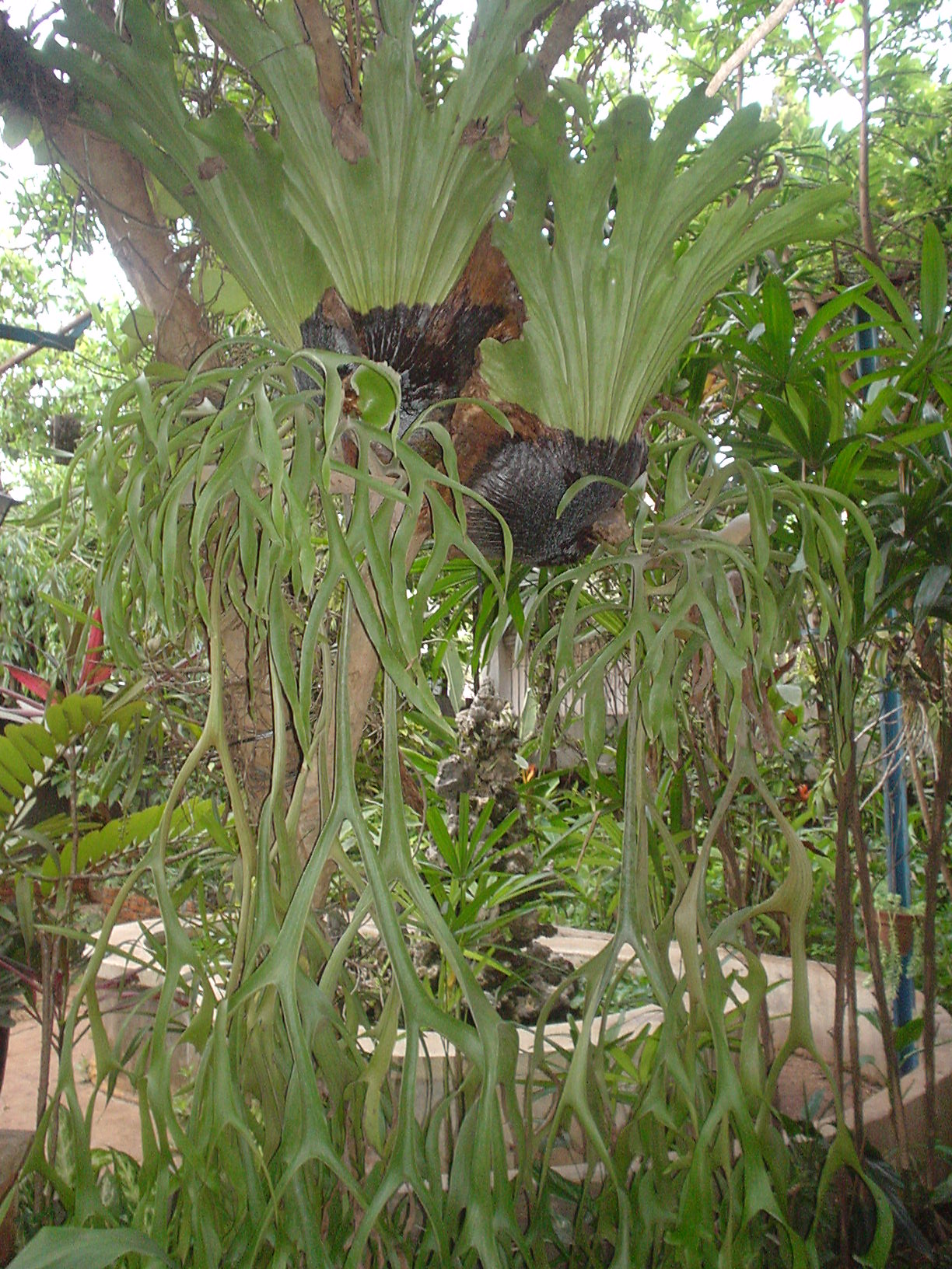 Cây Ổ rồng (Platycerium holttumii)